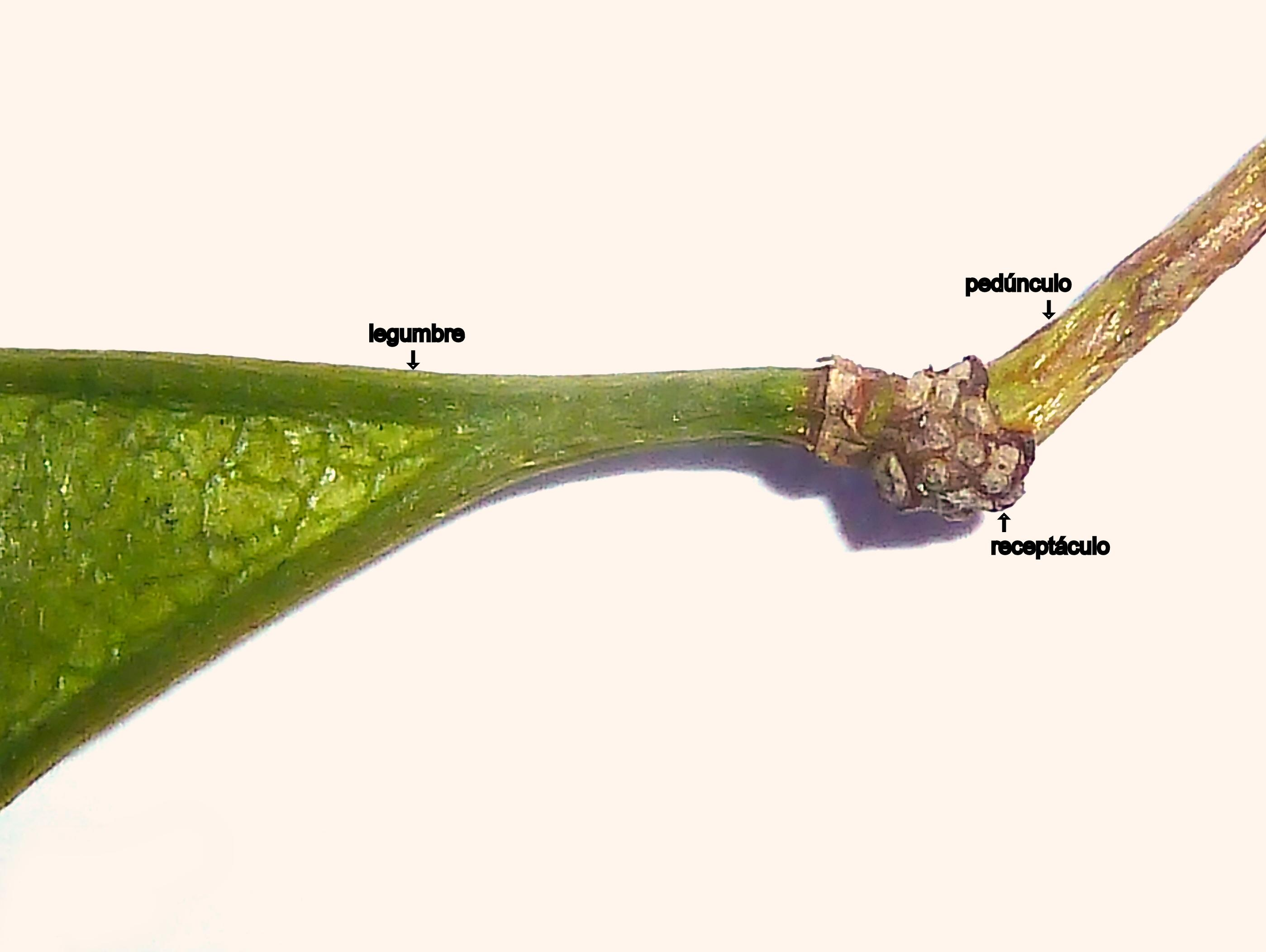 Albizia julibrissin (Acacia de Constantinopla) : Fruto (legumbre) inmaduro; detalle de de la implantación del fruto en el receptáculo floral, Ornamental, Plaza de Cibeles, Madrid Capital (España)